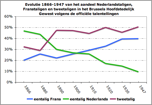 De resultaten van de talentellingen in het Brussels Hoofdstedelijk Gewest (zie